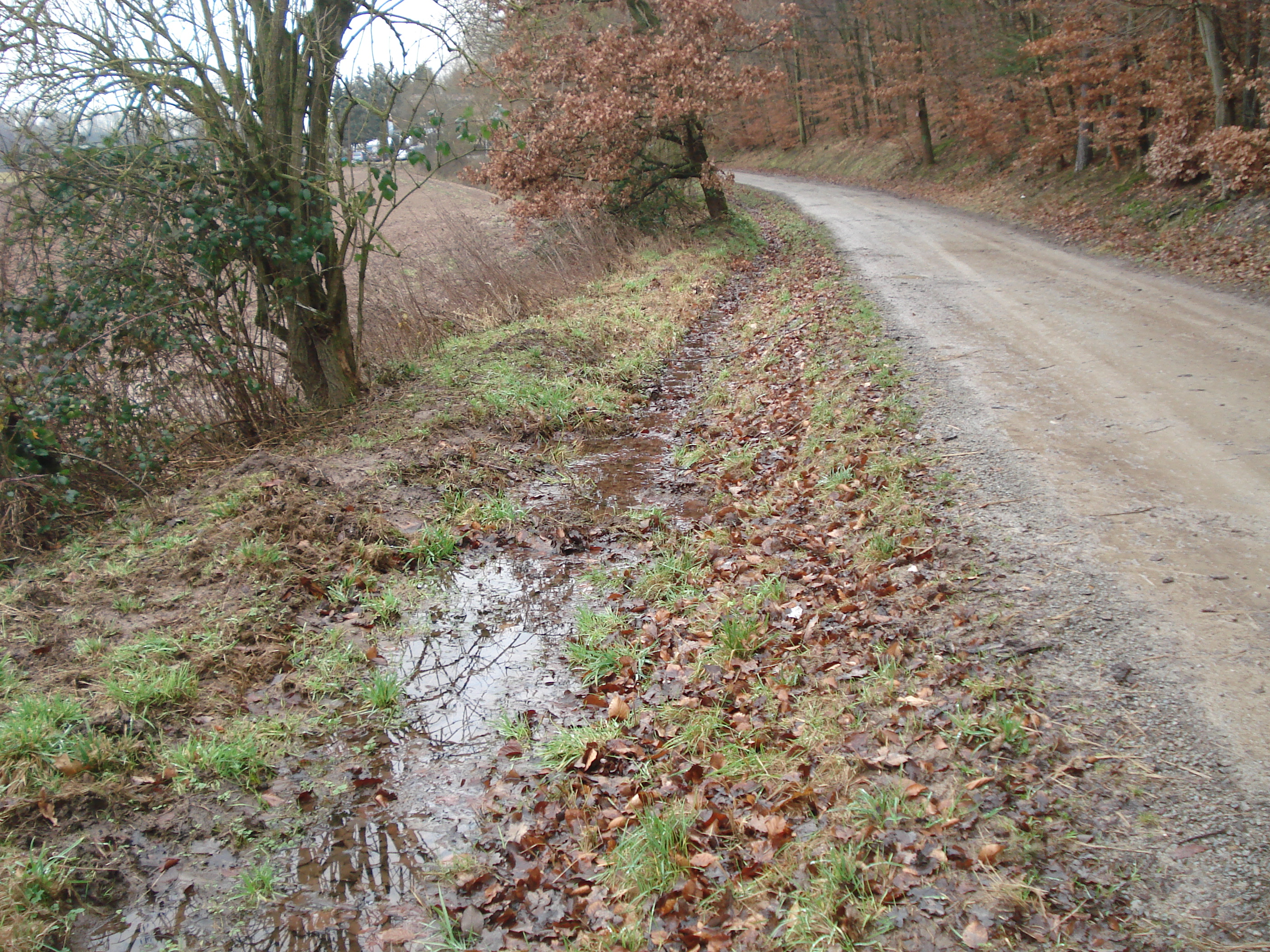 Der Triebsgraben (von vorne kommend) versickert allmählich im Seitengraben eines Weges, südlich vom Schluchthof bei Kleiostheim (Landkreis Aschaffenburg, Bayern)